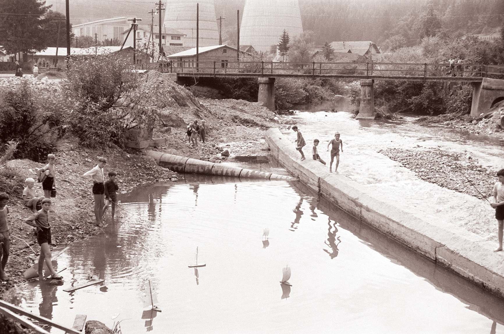 Igra otrok v Šoštanju